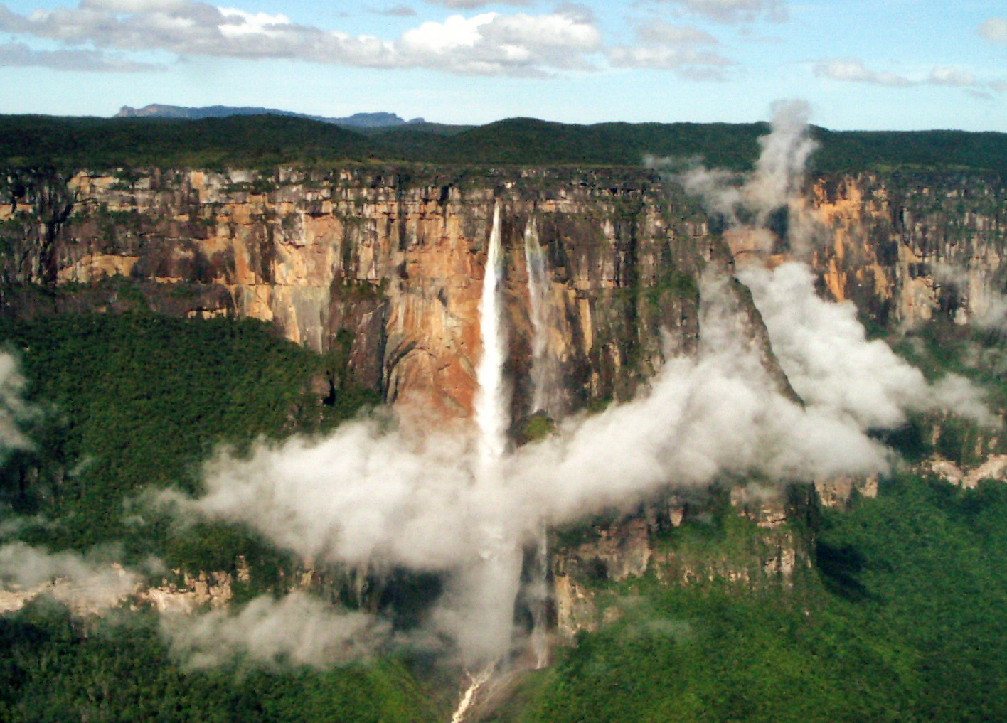 Vista aérea do Salto Angel, Venezuela.